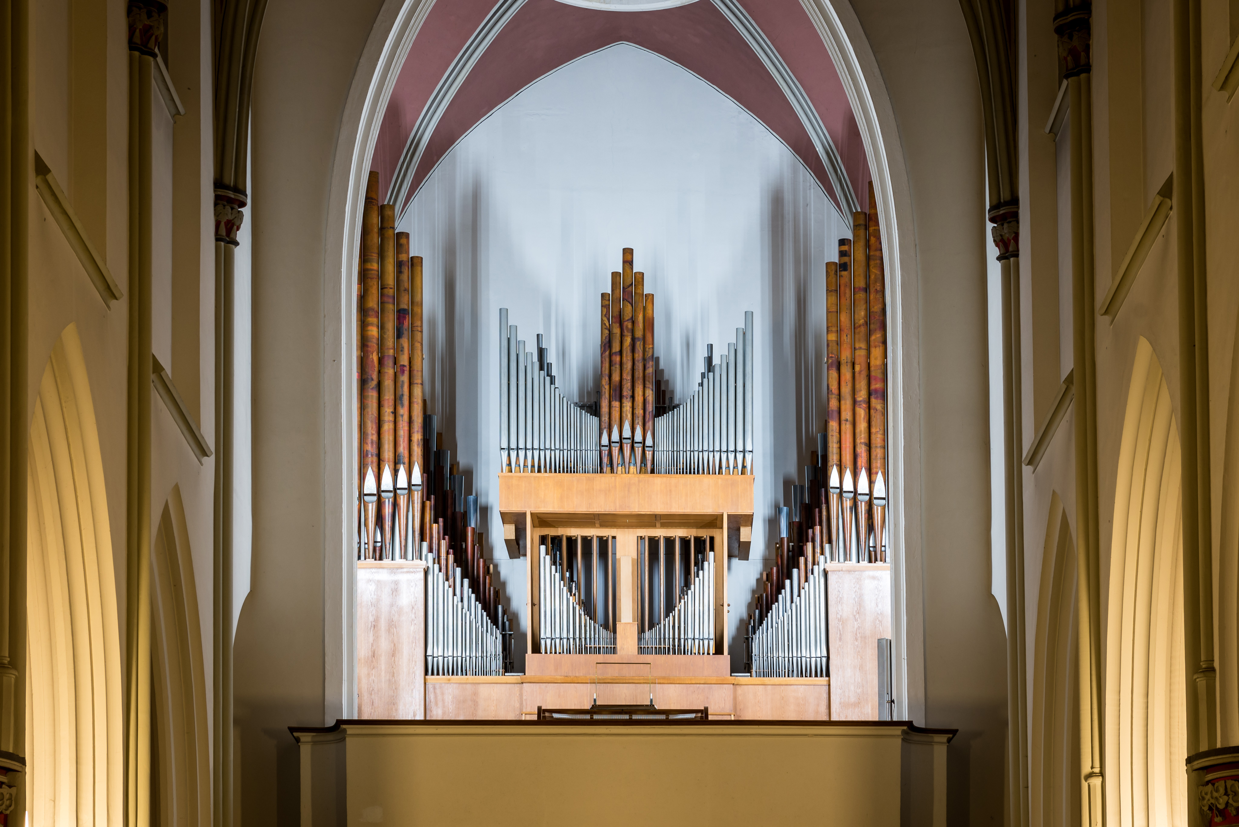 Prospekt der Orgel von Orgelbau Romanus Seifert & Sohn, Kevelaer.